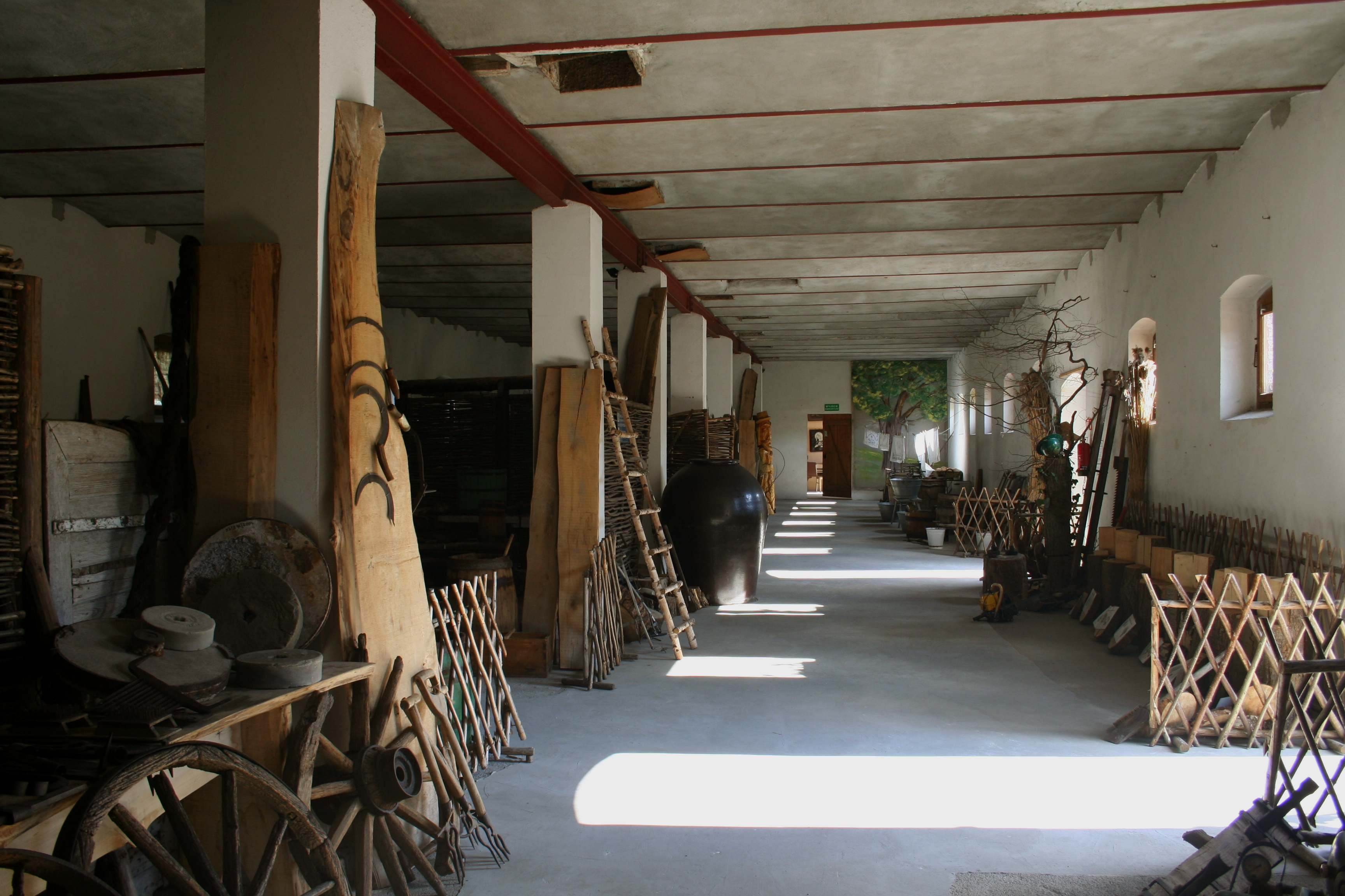 Mniszki. Folwark, 1863-1915, wnętrze - ekspozycja "ginących zawodów"